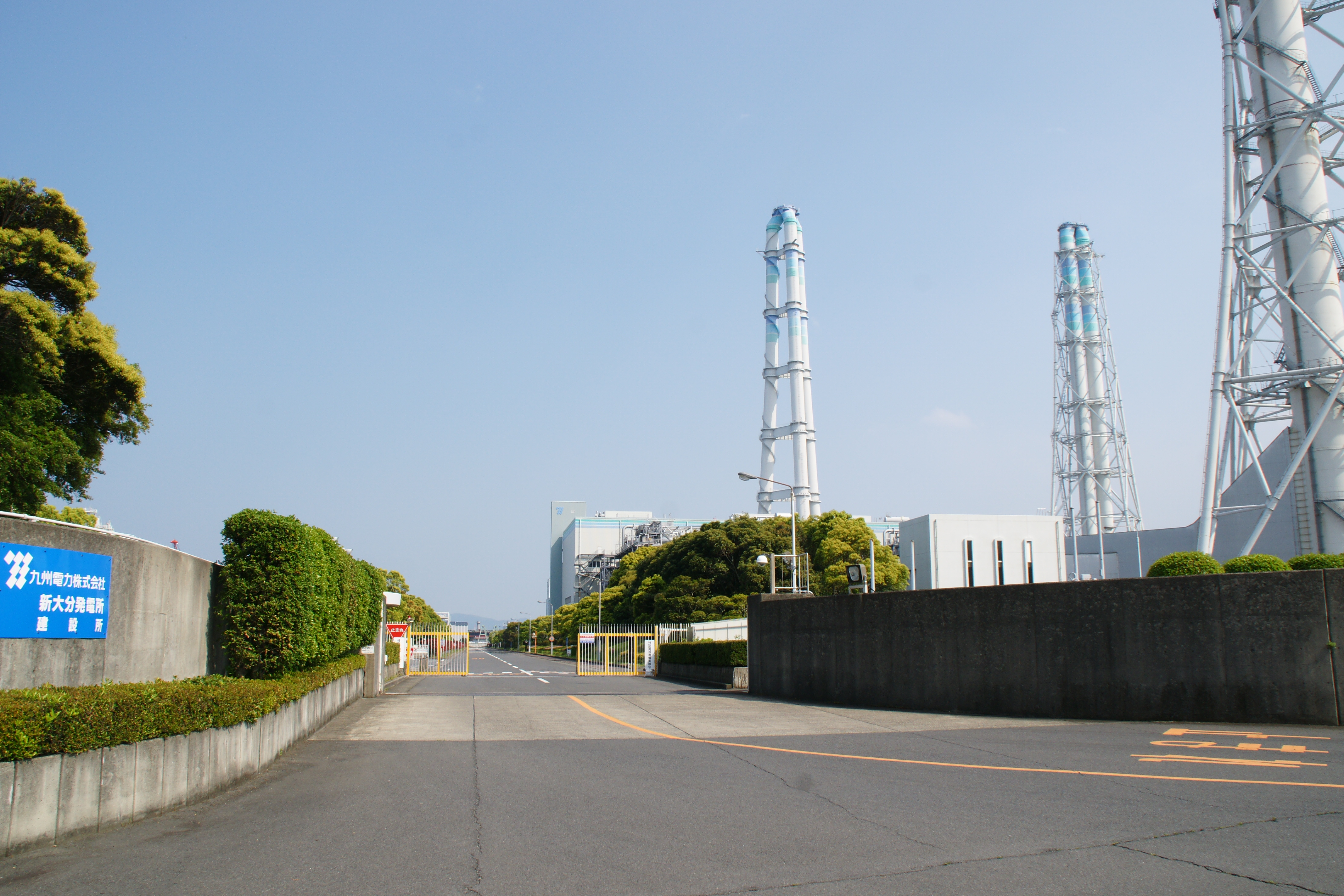 新大分発電所/ new ooita power plant